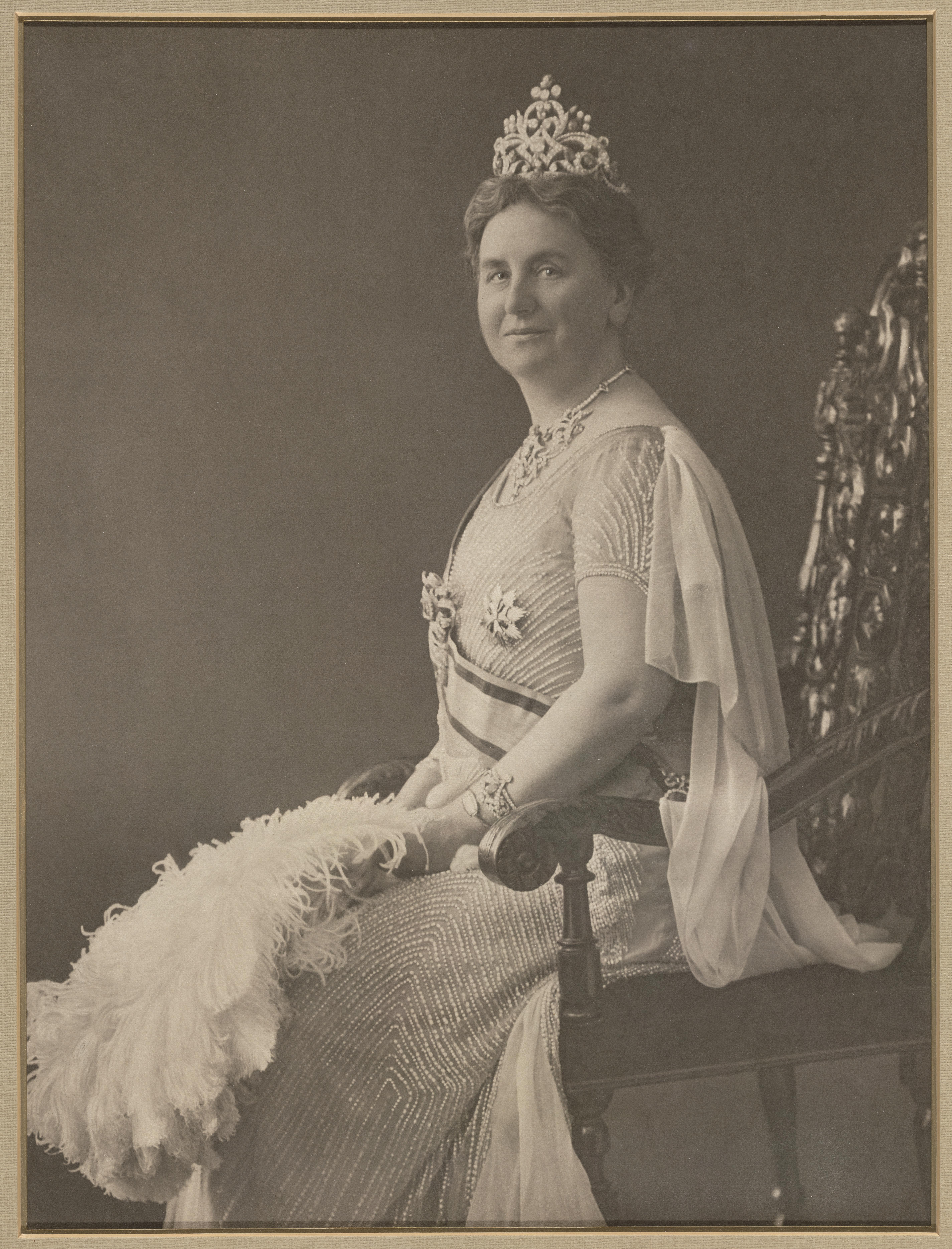 Beschrijving Staatsieportret van koningin Wilhelmina, aangeboden door de vereniging 'Hou en Trouw' ter gelegenheid van het 125-jarig bestaan van de Kamer van Koophandel van Fabrieken voor Amsterdam op 1 mei 1936 Techniek: reproductie in rasterdiepdruk van een kooldruk met enig wit gehoogd. Documenttype foto Vervaardiger Onbekend Anoniem Collectie Collectie Stadsarchief Amsterdam: foto-afdrukken Datering 1936 Inventarissen Afbeeldingsbestand ANWU00071000001